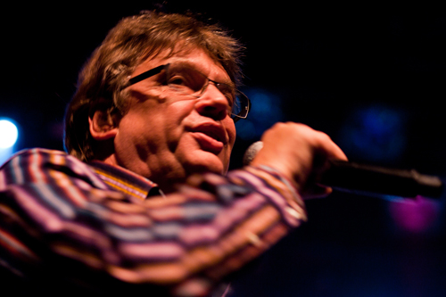 Henk Westbroek. Het Goede Doel cd presentatie Liefdewerk 14 februari 2011 Tivoli Utrecht. Copyright 2011 Eventshots.nl / Michael de Louw